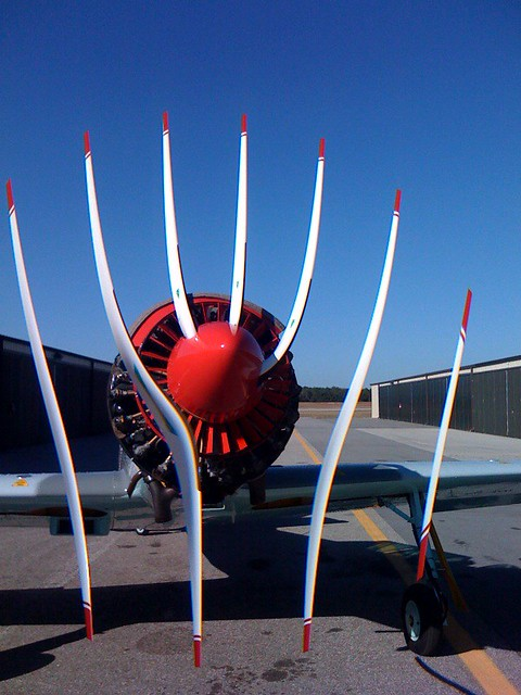 Fail kirjeldab veereva katiku nähtust